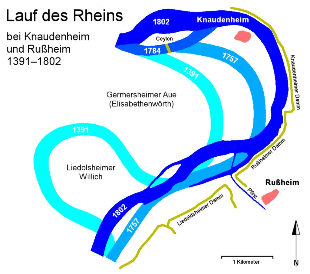 Lauf des Rheins bei Knaudenheim und Rußheim zwischen 1391 und 1802. Vereinfachte Darstellung nach: Heinz Musall: Die Entwicklung der Kulturlandschaft der Rheinniederung zwischen Karlsruhe und Speyer vom Ende des 16. bis zum Ende des 19. Jahrhunderts. (= Heidelberger Geographische Arbeiten, Heft 22) Geographisches Institut der Universität Heidelberg, Heidelberg 1969, Karte 41